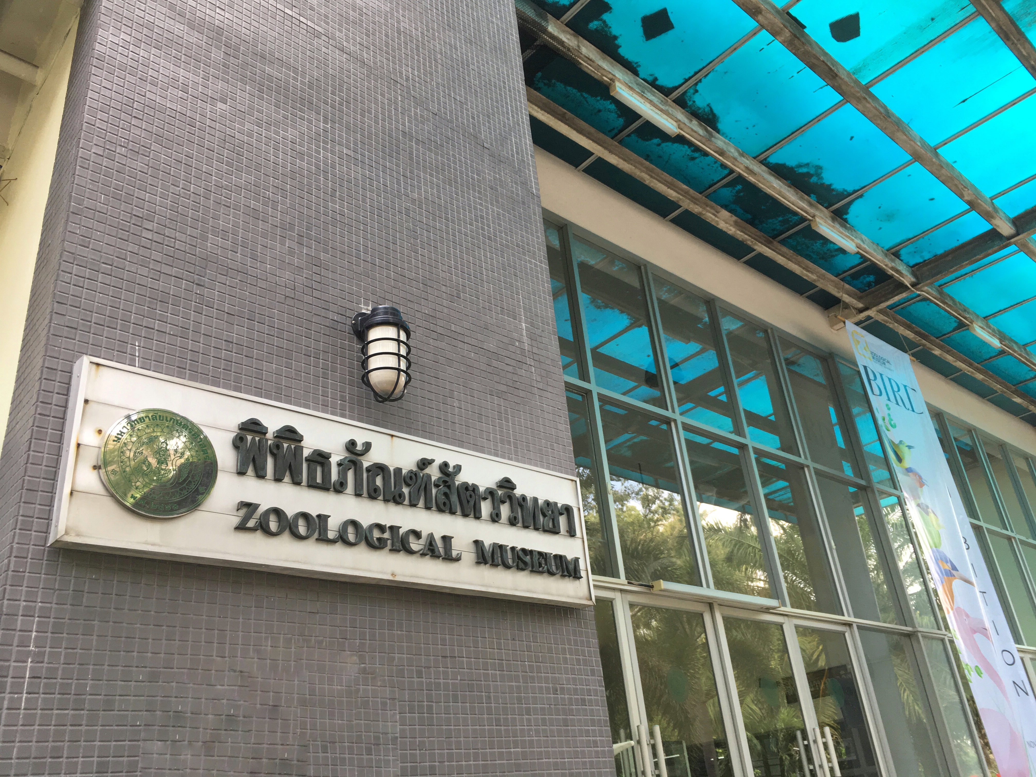 อาคารพิพิธภัณฑ์สัตววิทยา คณะวิทยาศาสตร์ มหาวิทยาลัยเกษตรศาสตร์